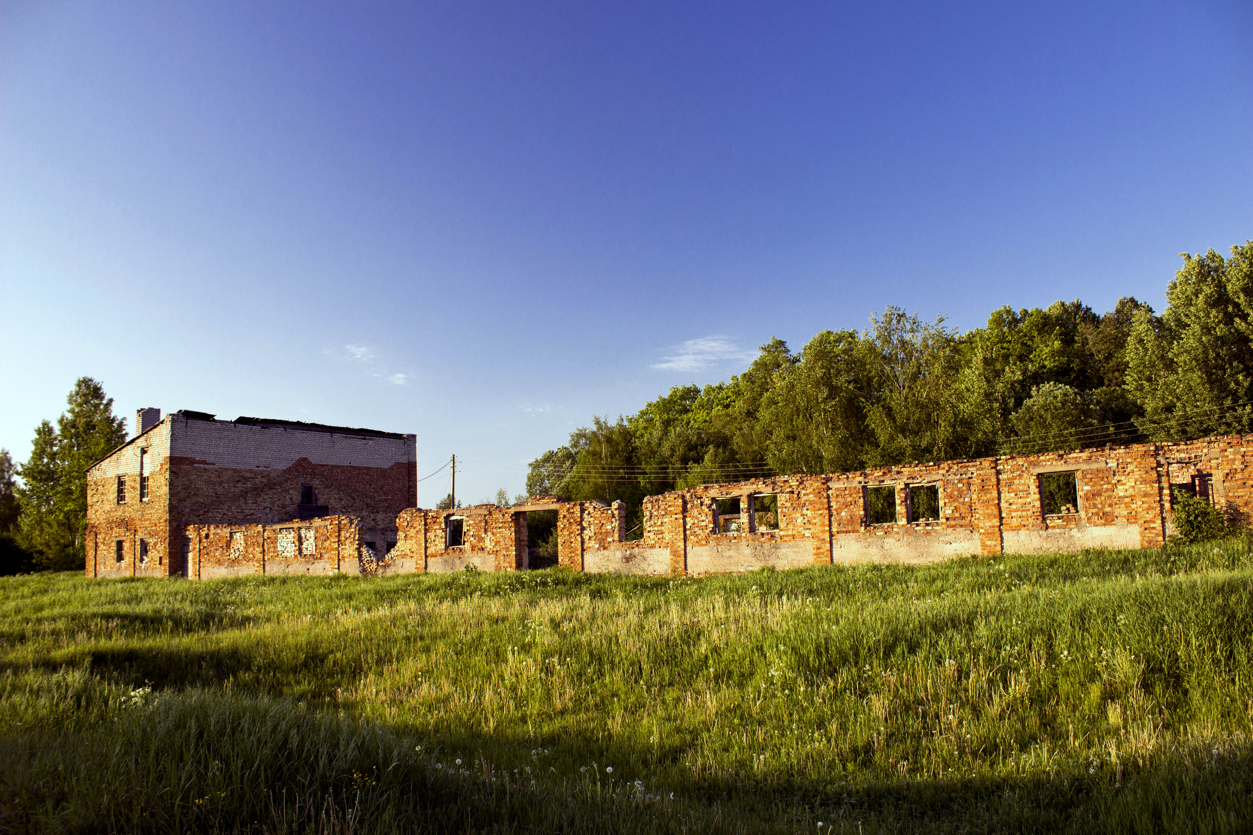 Turlava